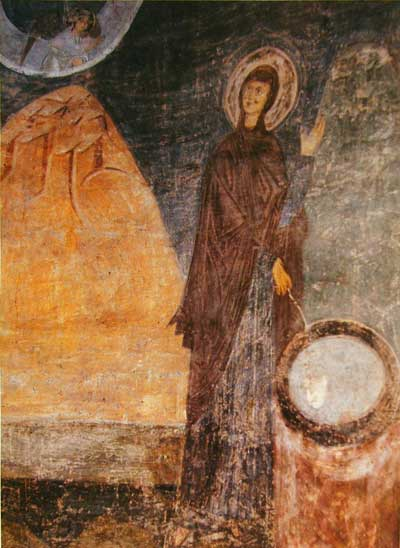 Фреска «Благовещение у кладезя». XI век. Собор святой Софии, Киев